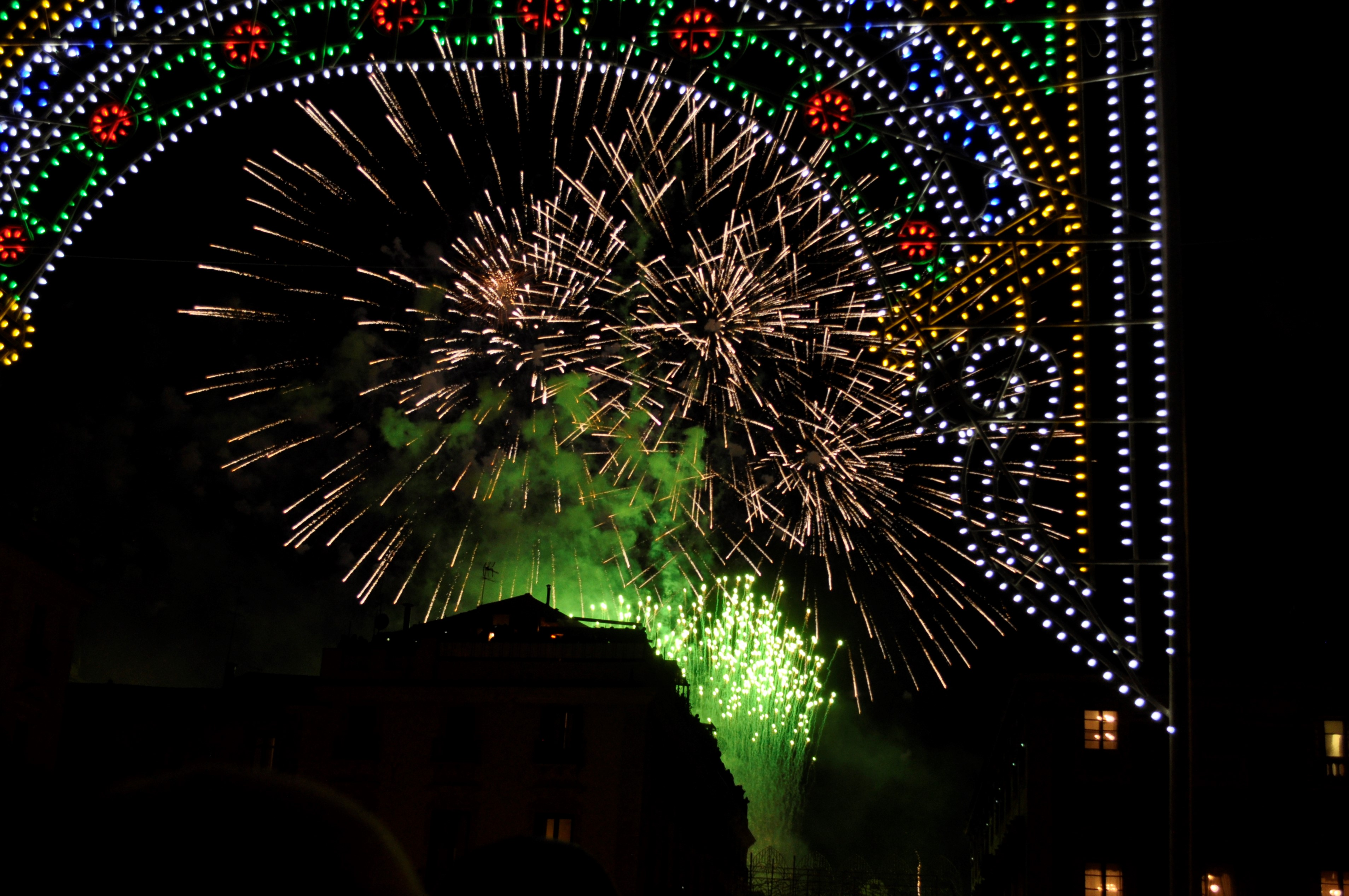 Fuochi pirotecnici della cosiddetta "A sira ô tri" durante l'edizione del 2018.